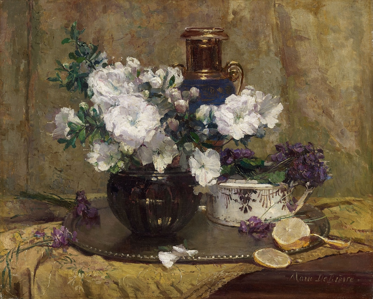 Stillleben mit weißer Azalee, blauen Veilchen und Zitrone. Signiert unten rechts: Marie de Bièvre. Öl auf Leinwand. 49 x 60 cm.